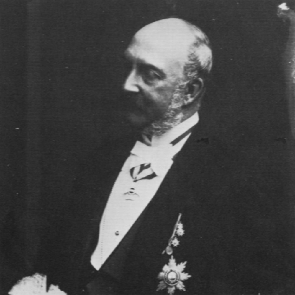 Atelier Nadar: Georg V. (1819-1878), König von Hannover 1851-1866